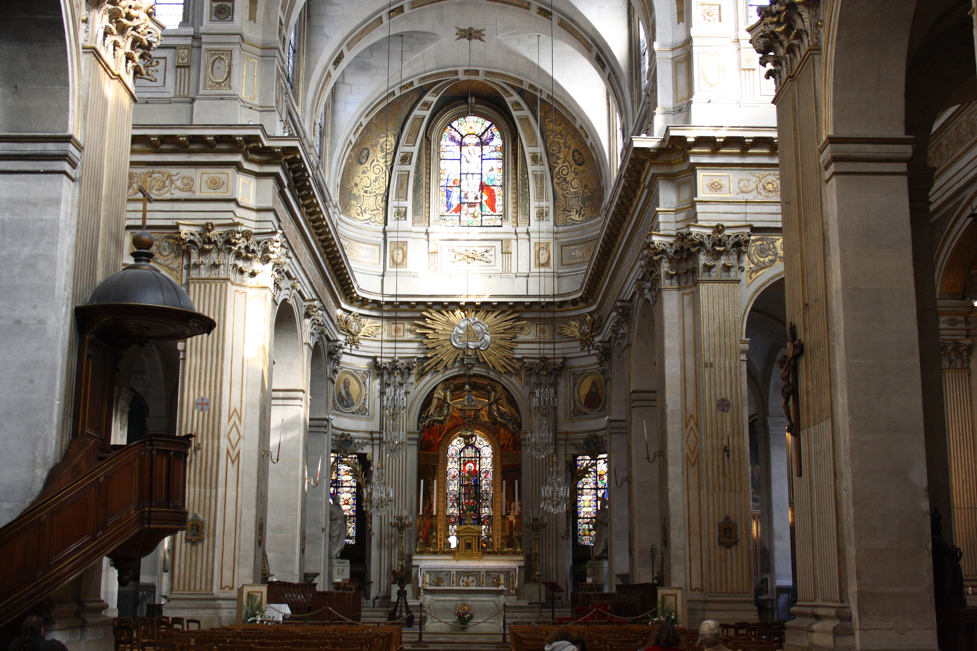 Katholische Pfarrkirche Saint-Louis-en-l'Île auf der Île Saint-Louis im 4. Arrondissement von Paris, Innenraum